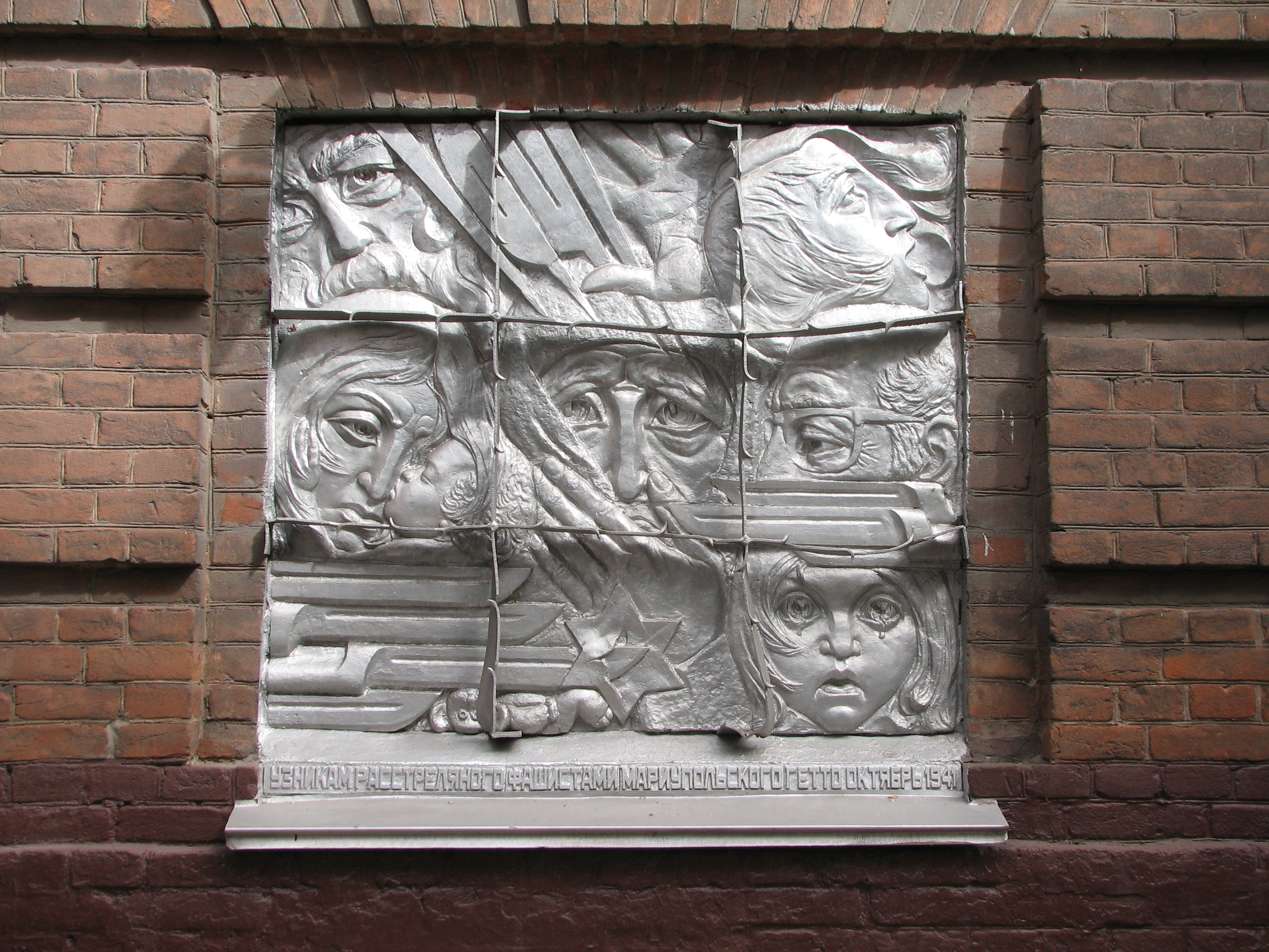 Будинок, у якому у 1941 р. знаходилось тимчасове єврейське гетто. Детальнiше